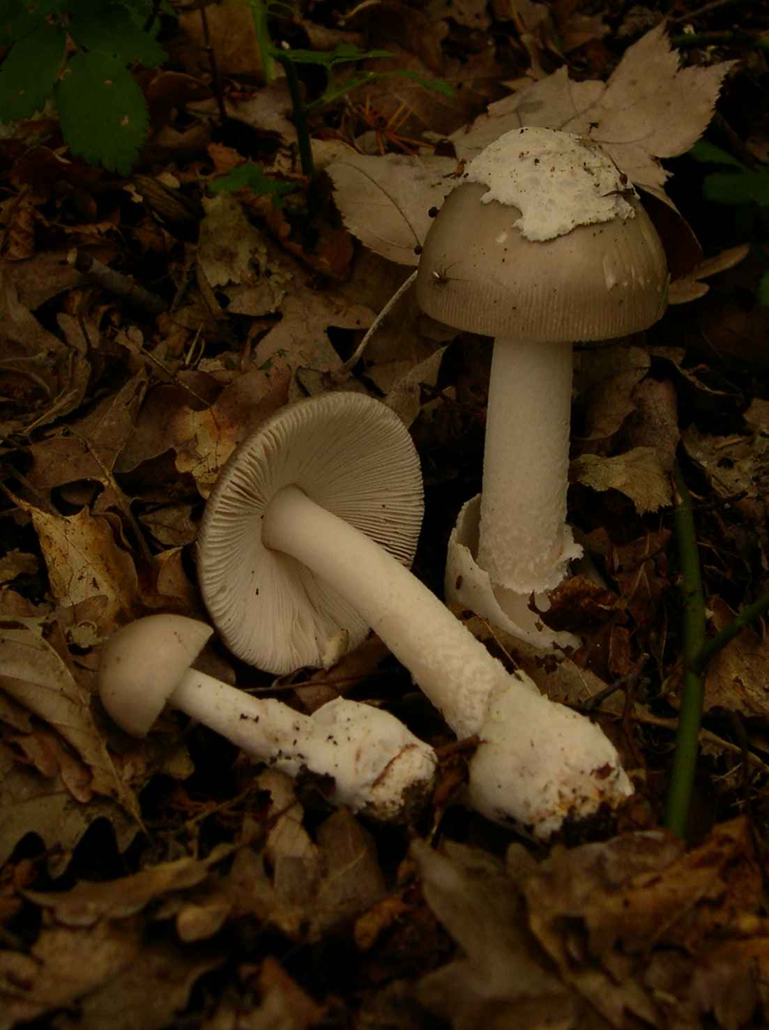 Amanita vaginata (Bull.) Lam.